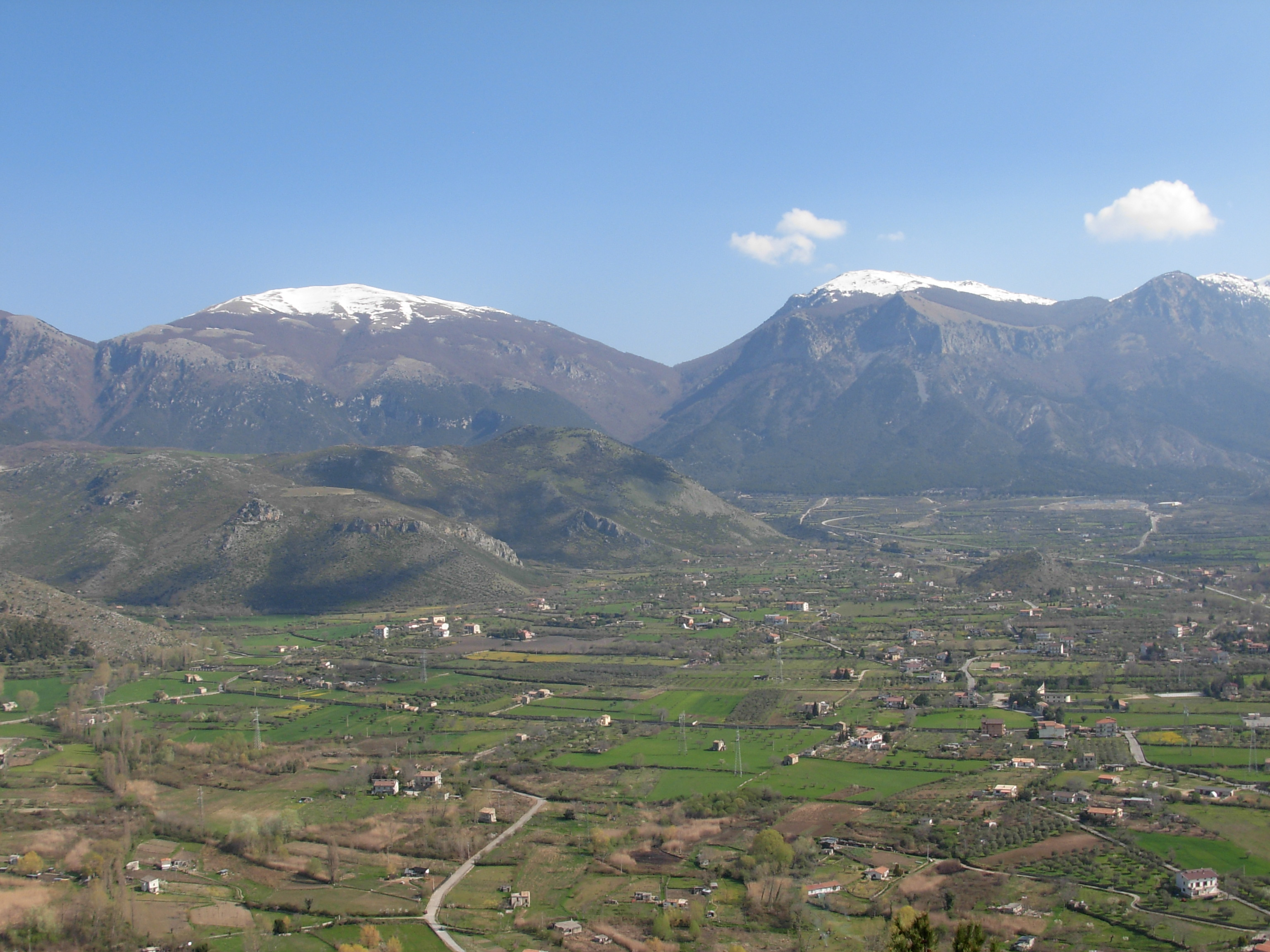 Catena montuosa del Pollino